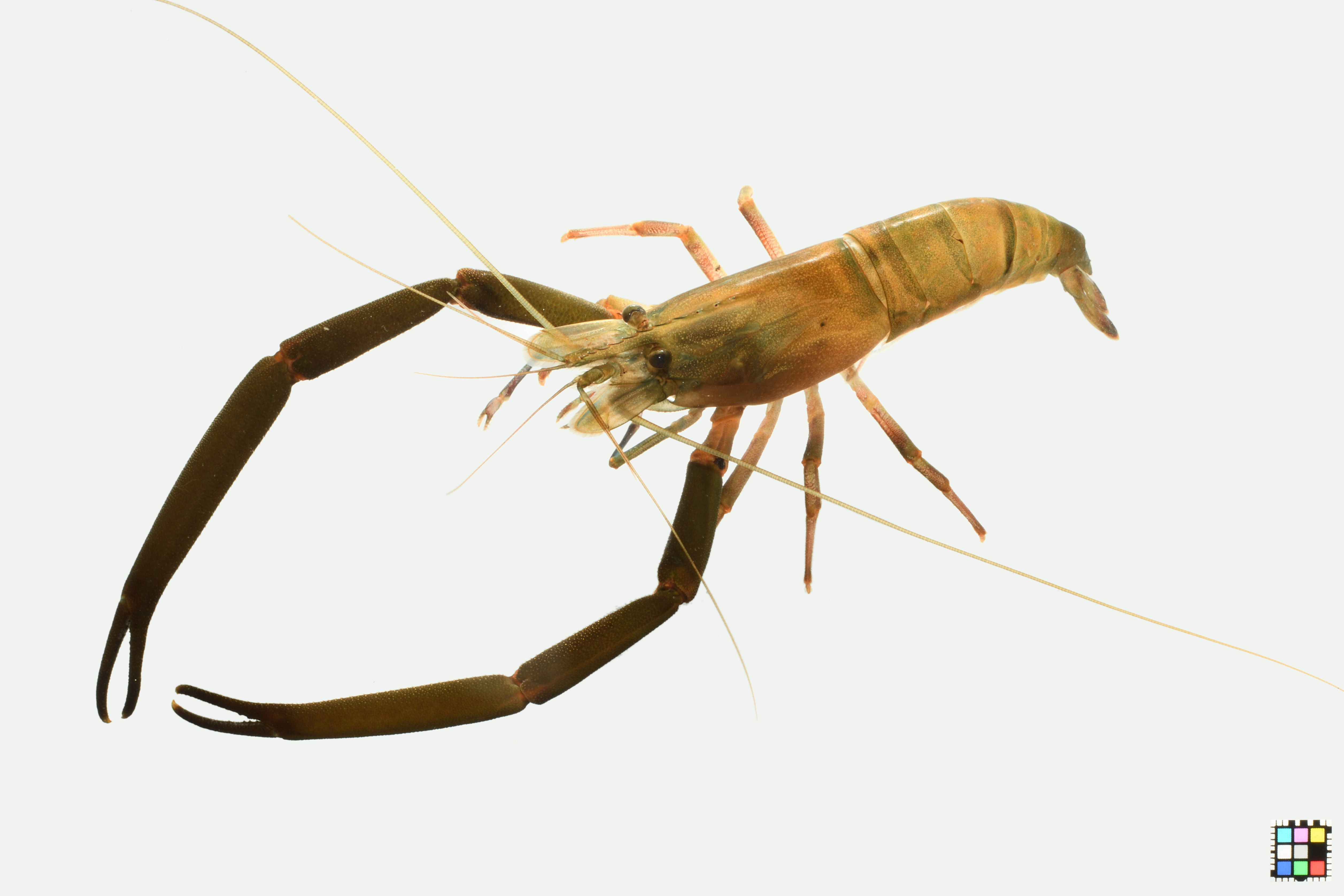 ヒラテテナガエビのオス．福岡県 詳細